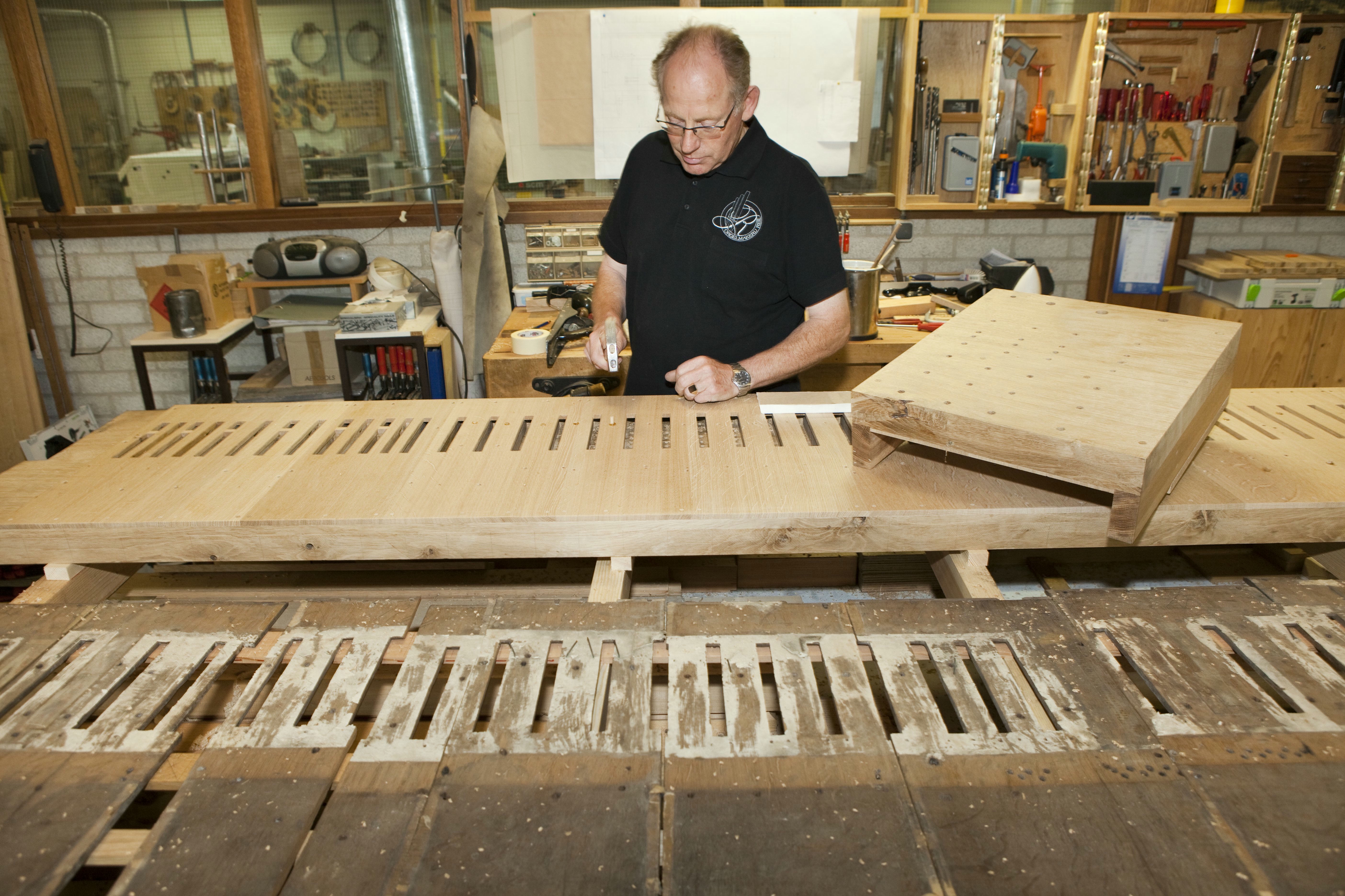 Nicolaï Orgel: Interieur orgelmakerij Reil te Heerde, orgelbouwer tijdens werkzaamheden